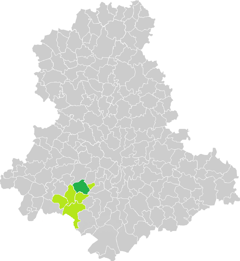 Carte de situation de la commune de Flavignac (en vert foncé) dans le votre Canton (en vert clair) sur une carte des communes de la Haute-Vienne